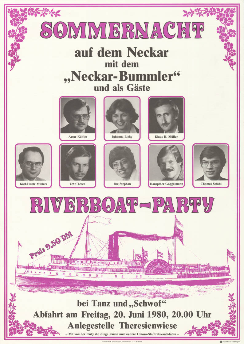 Sommernacht auf dem Neckar mit dem "Neckar-Bummler" und als Gäste ... Riverboat-Party ... - Mit von der Party die Junge Union und weitere Unions-Stadtratskandidaten - Abbildung: Porträtfotos - Riverboat Kommentar: u.a. mit Thomas Strobl Plakatart: Ankündigungsplakat Auftraggeber: Verantw.: Andreas Fuchs, Heilbronn Drucker_Druckart_Druckort: druckhaus waiblingen Objekt-Signatur: 10-028 : 48 Bestand: Plakate von Jugendorganisationen der Parteien ( 10-028) GliederungBestand10-18: Plakate von Jugendorganisationen der Parteien (10-028) » CDU » Veranstaltungsplakate A - Z Lizenz: KAS/ACDP 10-028 : 48 CC-BY-SA 3.0 DE